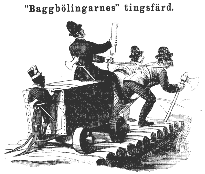 Satirisk kommentar i tidningen Fäderneslandet till rättegången mot Baggböle sågverks ägare 1867. Firmans chef Oscar Dickson rider här på en skattkista dragen av två flottchefer - det var flottchefen som ställdes inför rätta.